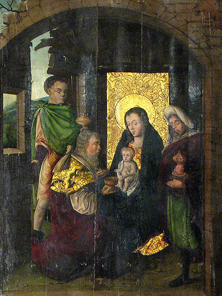 Retablo